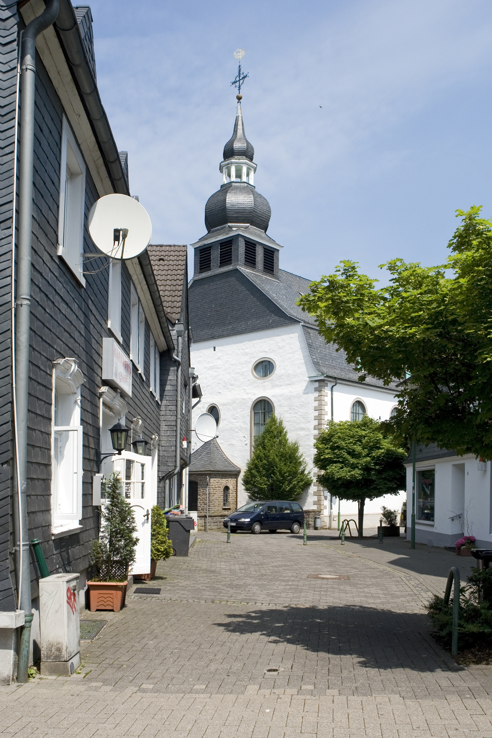 Radevormwald, Evangelisch-Lutherische Kirche von 1804